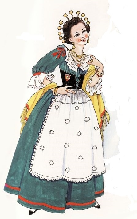 Cecca in una stampa ottocentesca